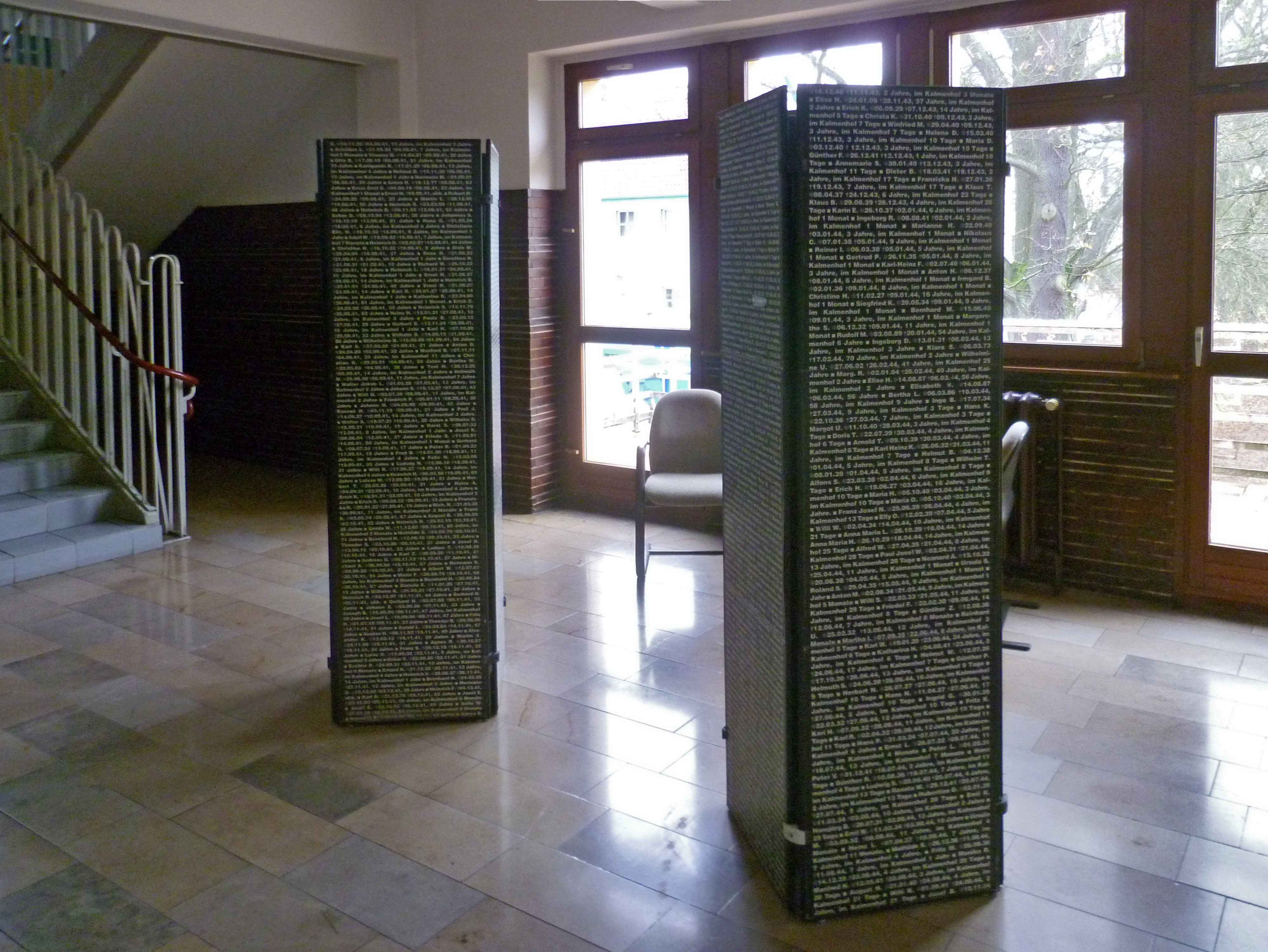 Die Namen der am Kalmenhof in der NS-Zeit getöteten Personen finden sich auf diesen Säulen, soweit sie nachvollziehbar sind.